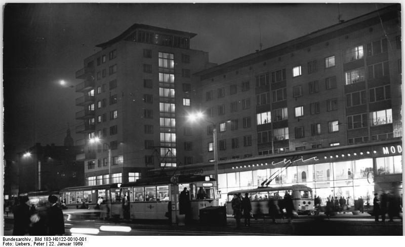 Gera, Straße der Republik, Straßenbahnhaltestelle Zentralbild Liebers 22.1.1969 Gera: im neuen Stadtzentrum der Bezirkshauptstadt - die Straße der "Republik"